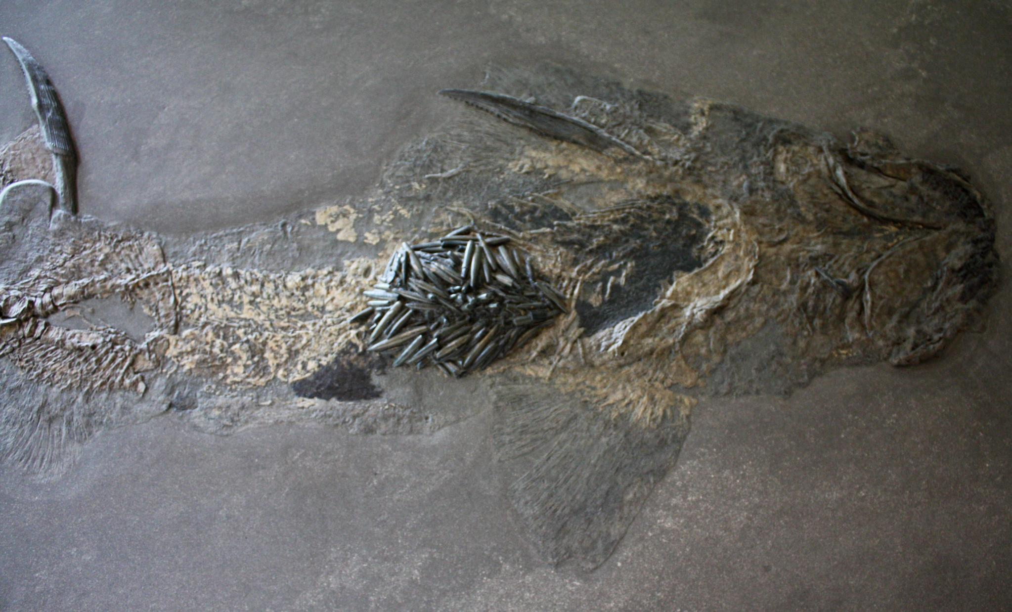 ... und hatte nen vollen Magen (lauter Rostren von Bolemniten) Urwelt-Museum Hauff in Holzmaden